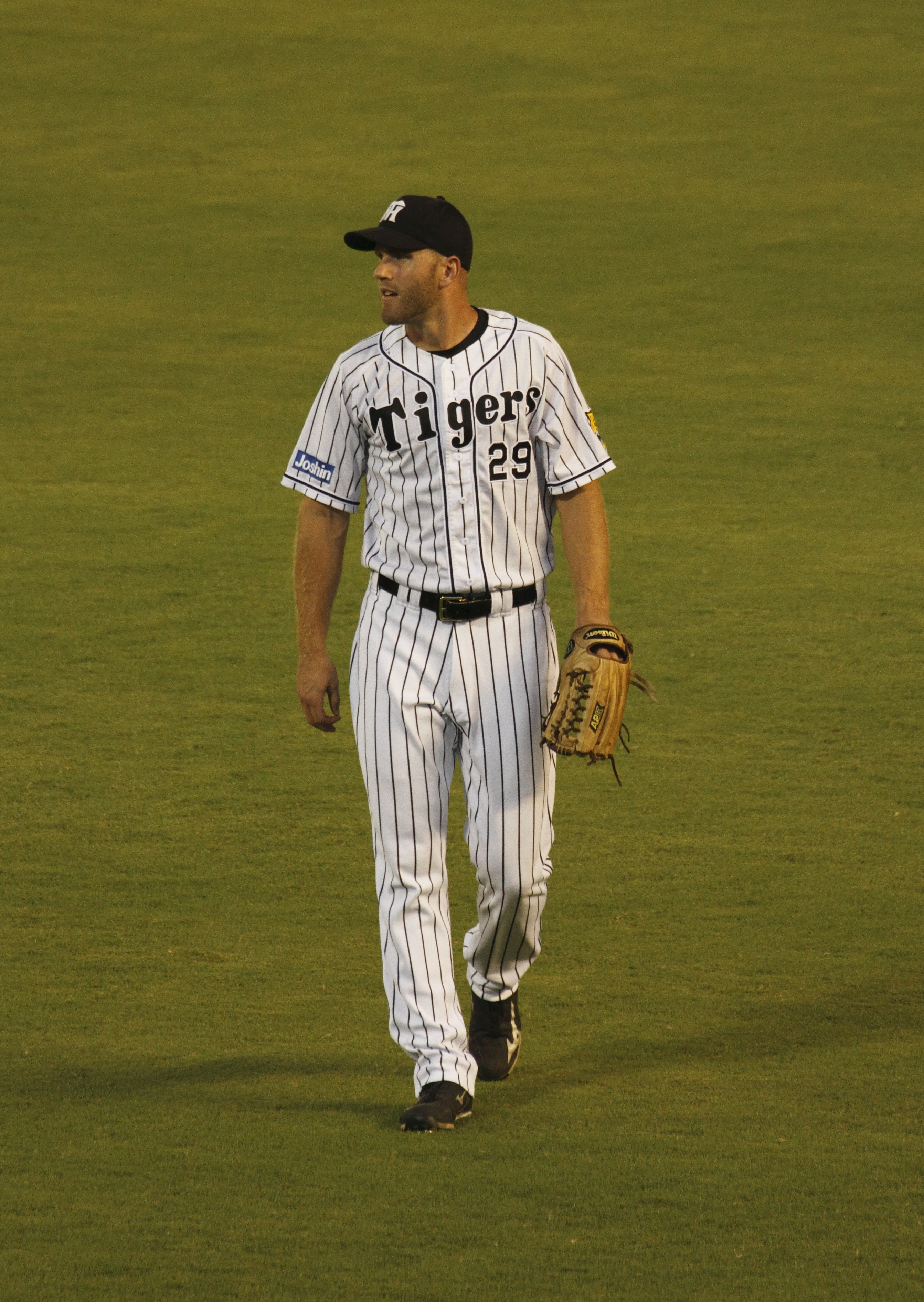 エリック・キャンベル。阪神タイガース時代。倉敷市のマスカットスタジアムで行われたウエスタン・リーグ公式戦にて。 Canon EOS 7D